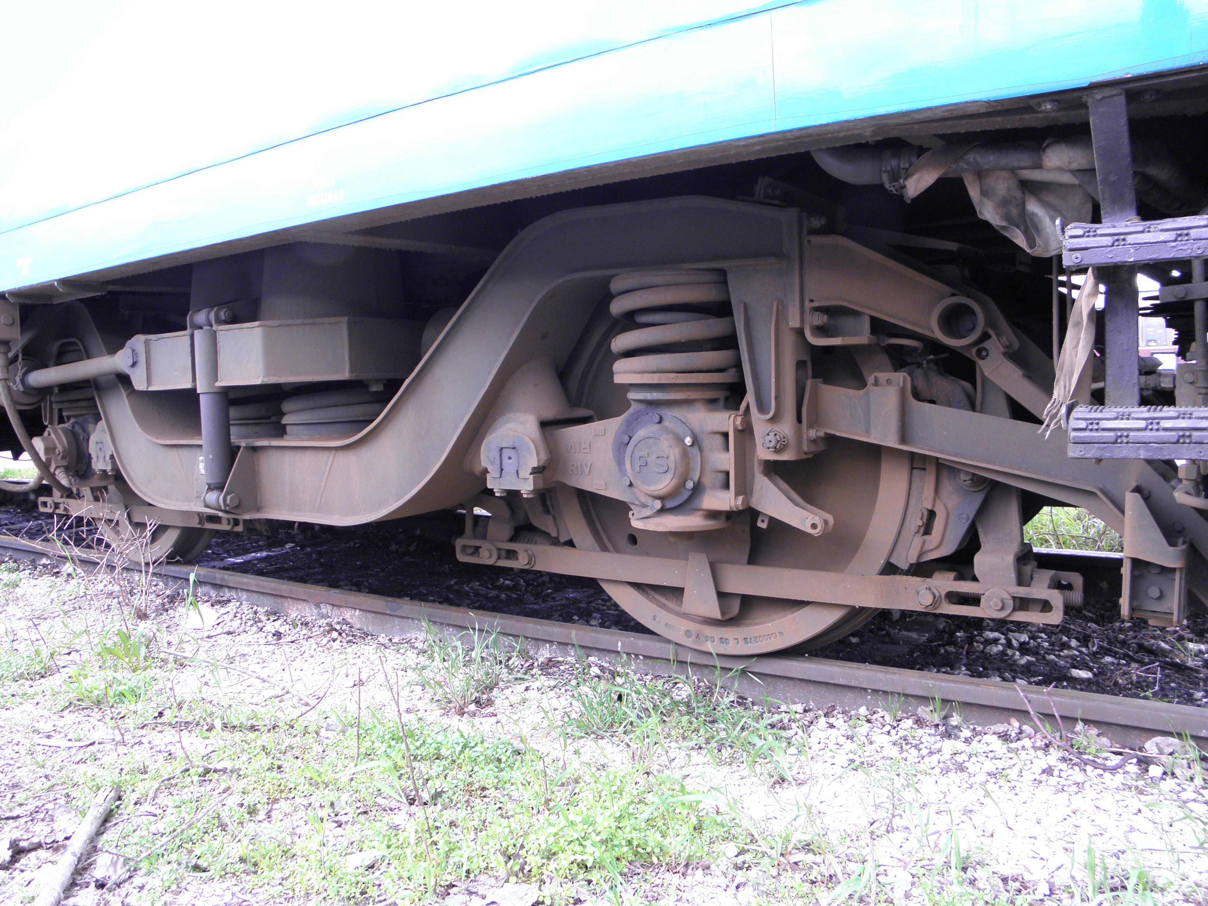 Automotrice ALn 668 1256 prodotta dalla Officine Meccaniche Calabresi (OMECA) in sosta nella stazione di Rovigo: dettaglio carrello.